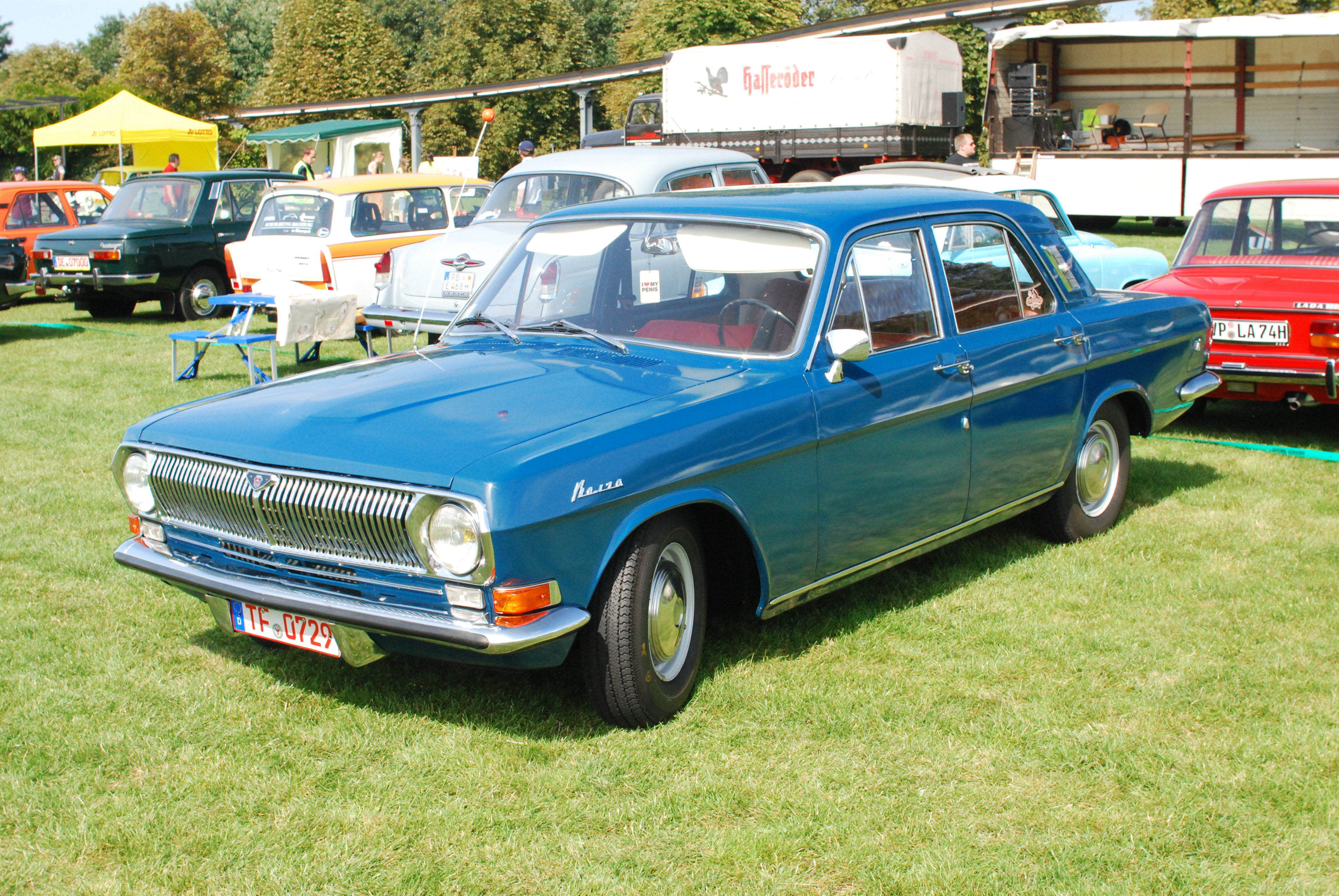 Fotos von der OMMMA 2011 am 03.09.2011 im Magdeburger Elbauenpark